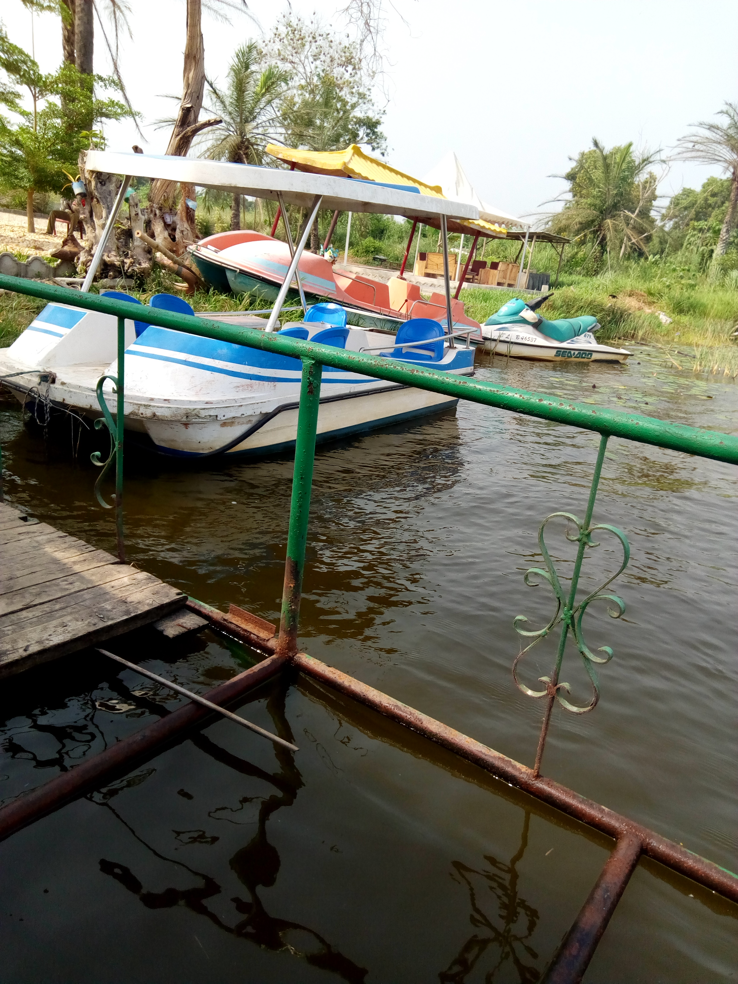 embarcadère du lac toho au Bénin